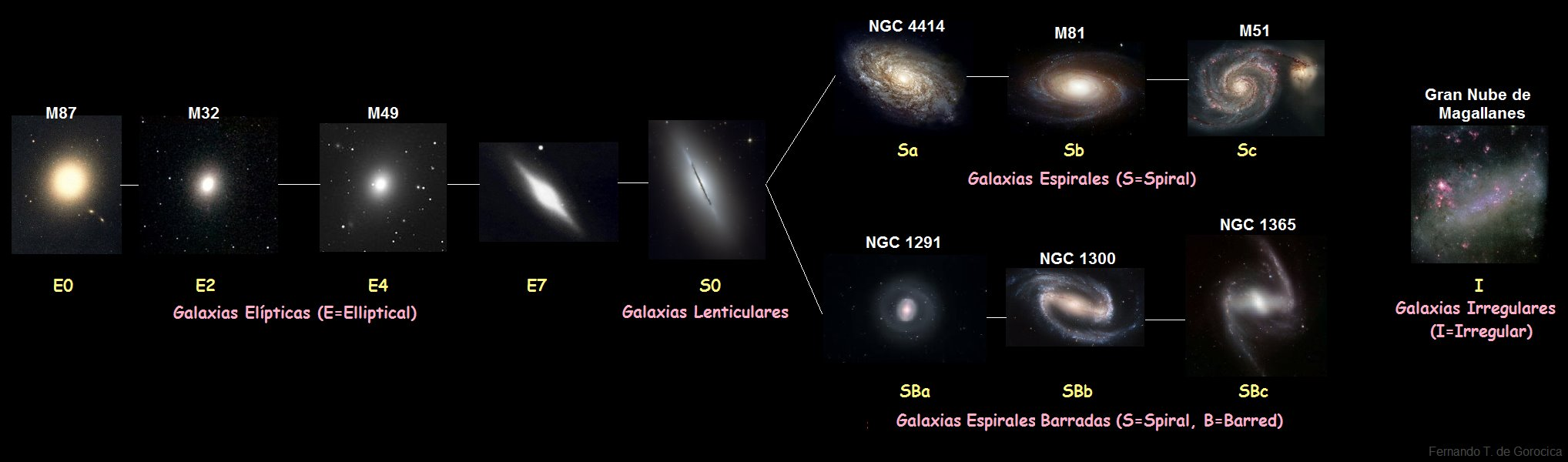 CLASIFICACIÓN DE LAS GALAXIAS SEGÚN HUBBLE. Clasificación según Edwin P. Hubble (1889-1953). E = elípticas, de 0 a 7. Cero (0) es una esfera y 7 una elipsoide. S0 = lenticulares, por la forma de una lente. S = espirales (a=brazos cerrados, b=medianamente cerrados y c=abiertos), tal como un remolino con un centro muy luminoso y compacto formado por gases y estrellas. SB = espirales barradas (a=brazos cerrados, b=medianamente cerrados y c=abiertos). Las espirales barradas son como remolinos pero en su centro presentan una barra, generalmente recta y más luminosa, formada por gases y estrellas, todo muy compacto como los centros de las galaxias espirales simples. De las observadas y catalogadas: el 77% son espirales y espirales barradas, el 20% son elípticas y el 3% irregulares. Nota: no hay en el espacio, Universo, las del tipo S2Bc (espirales doble barradas clase "c").